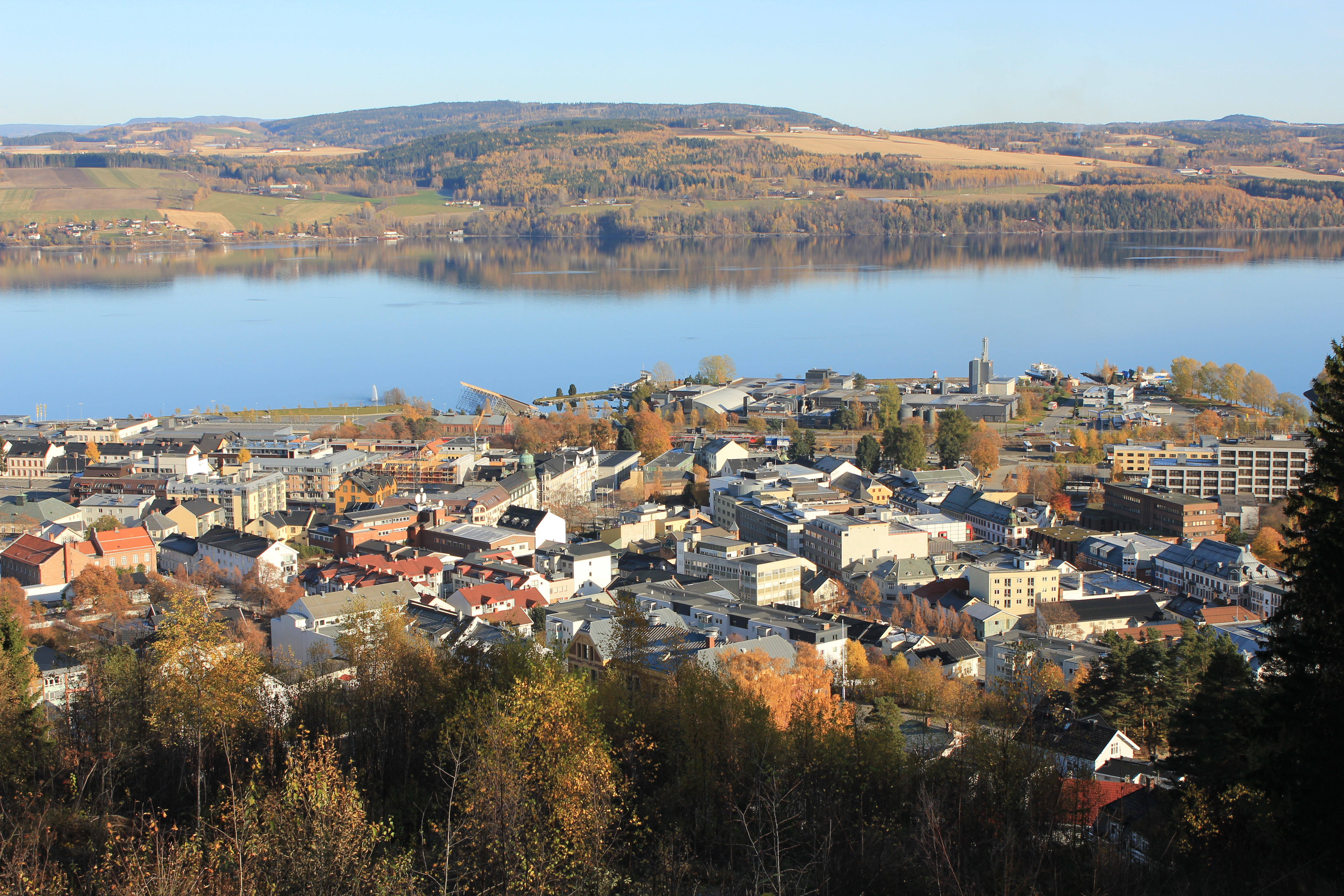 Gjøvik sentrum sett fra Hovdetoppen.